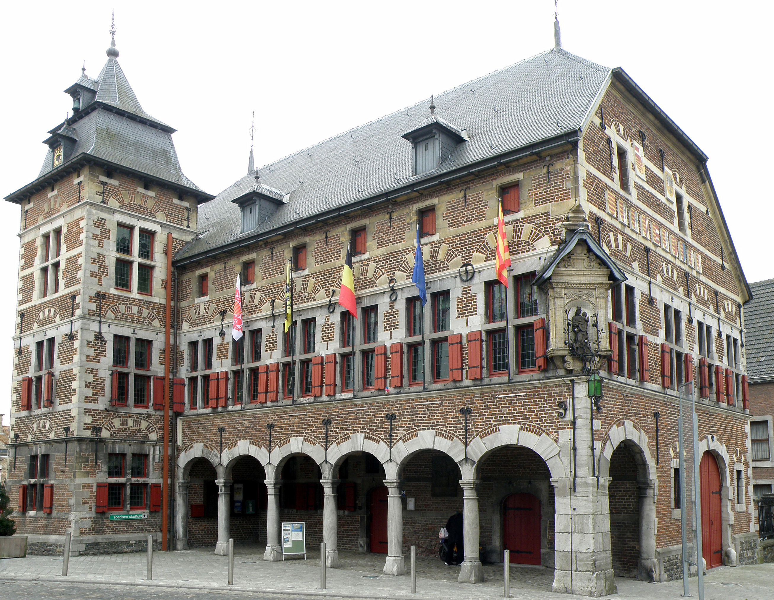 Looz (en néerl. Borgloon), prov. de Limbourg, Belgique. Hôtel de ville.